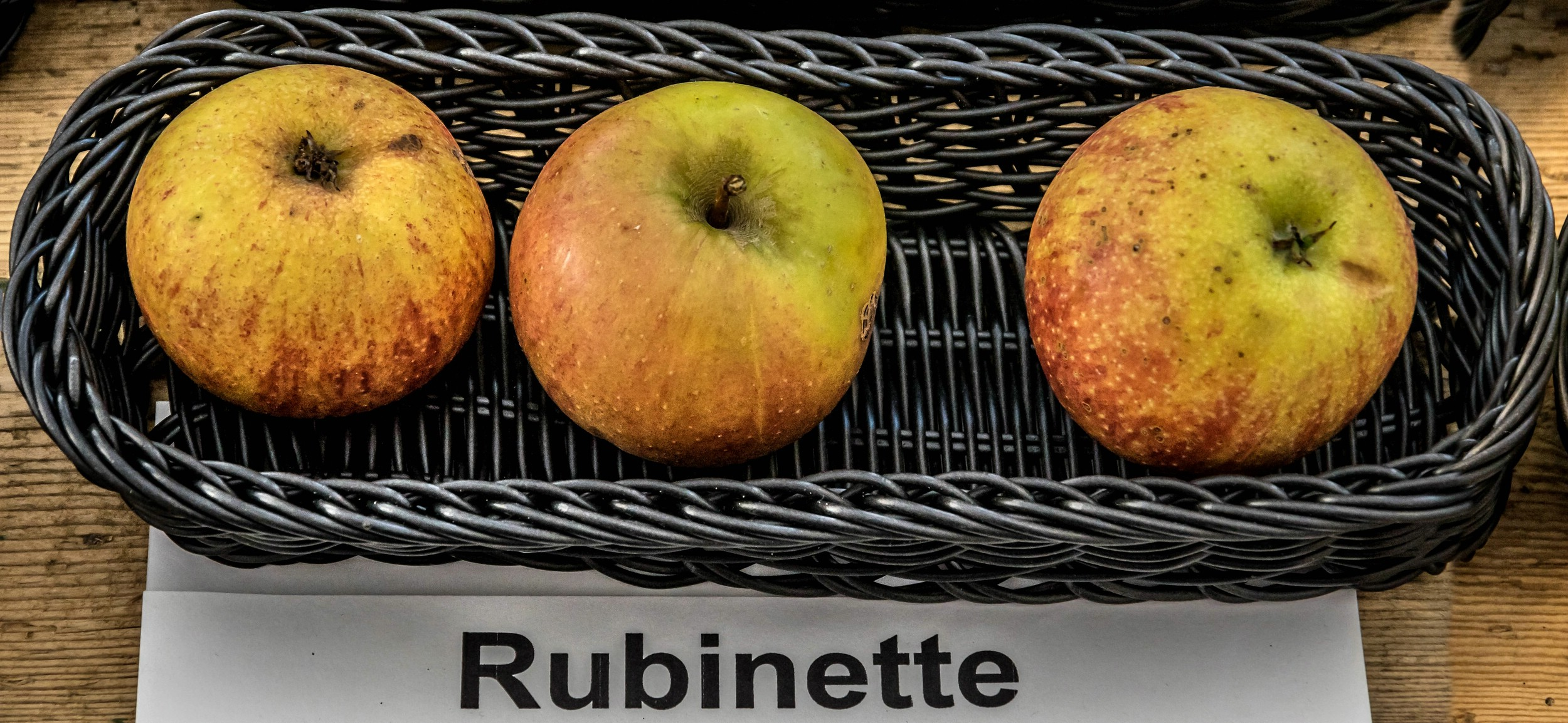 Alte Apfelsorten, von denen es im Badischen noch tragende Bäume gibt. Alle Aufnahmen au dem Oktober 2015